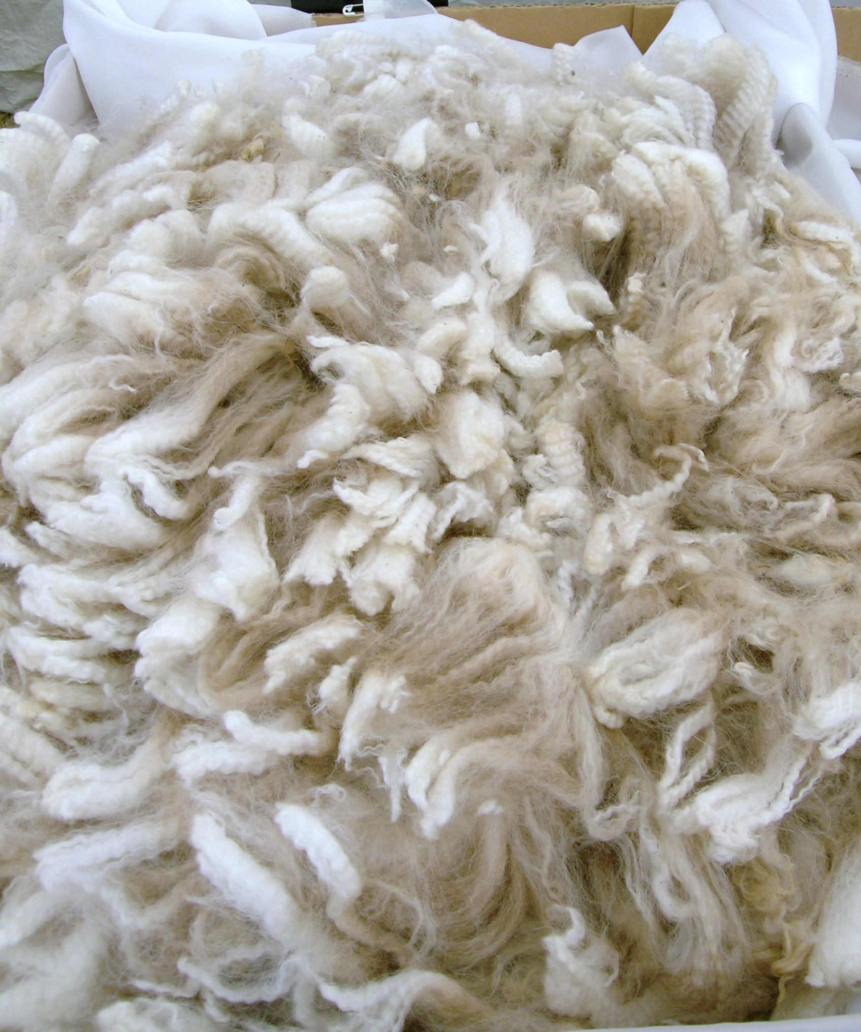 Alpaca fleece, Wool Expo, Armidale, NSW